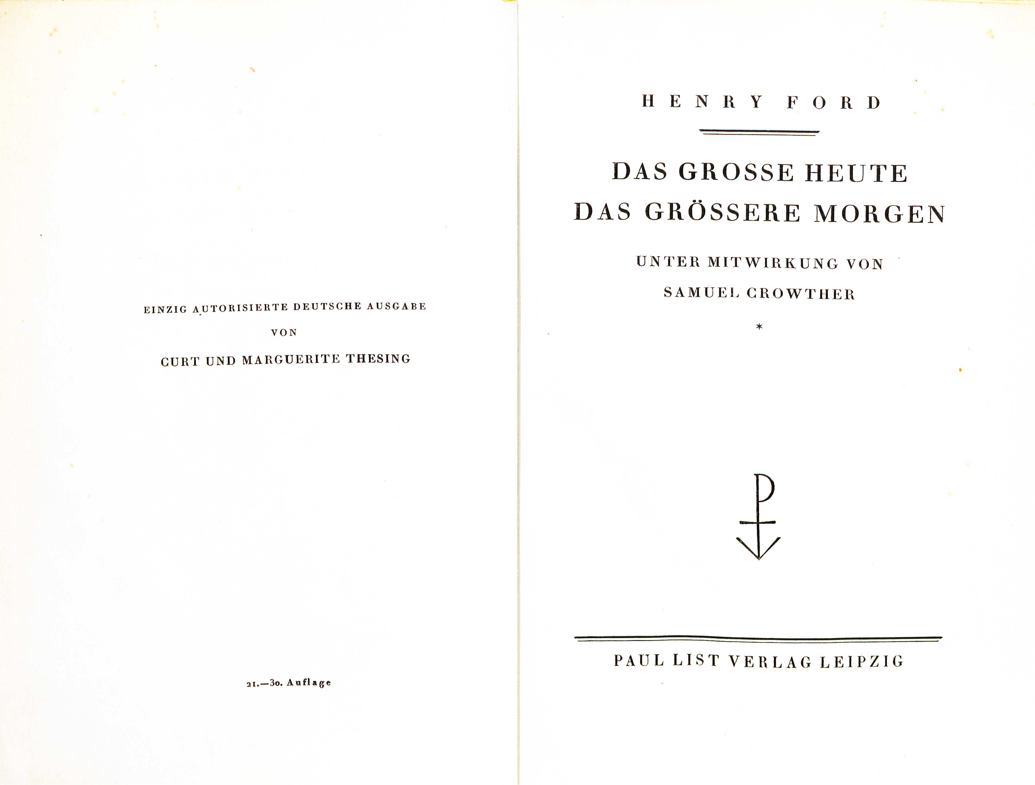 Henry Ford zusammen mit Samuel Crowther: Das große Heute. Das größere Morgen. Übersetzung aus dem Englischen Curt Thesing zusammen mit Marguerite Thesing. List, Leipzig 1926.